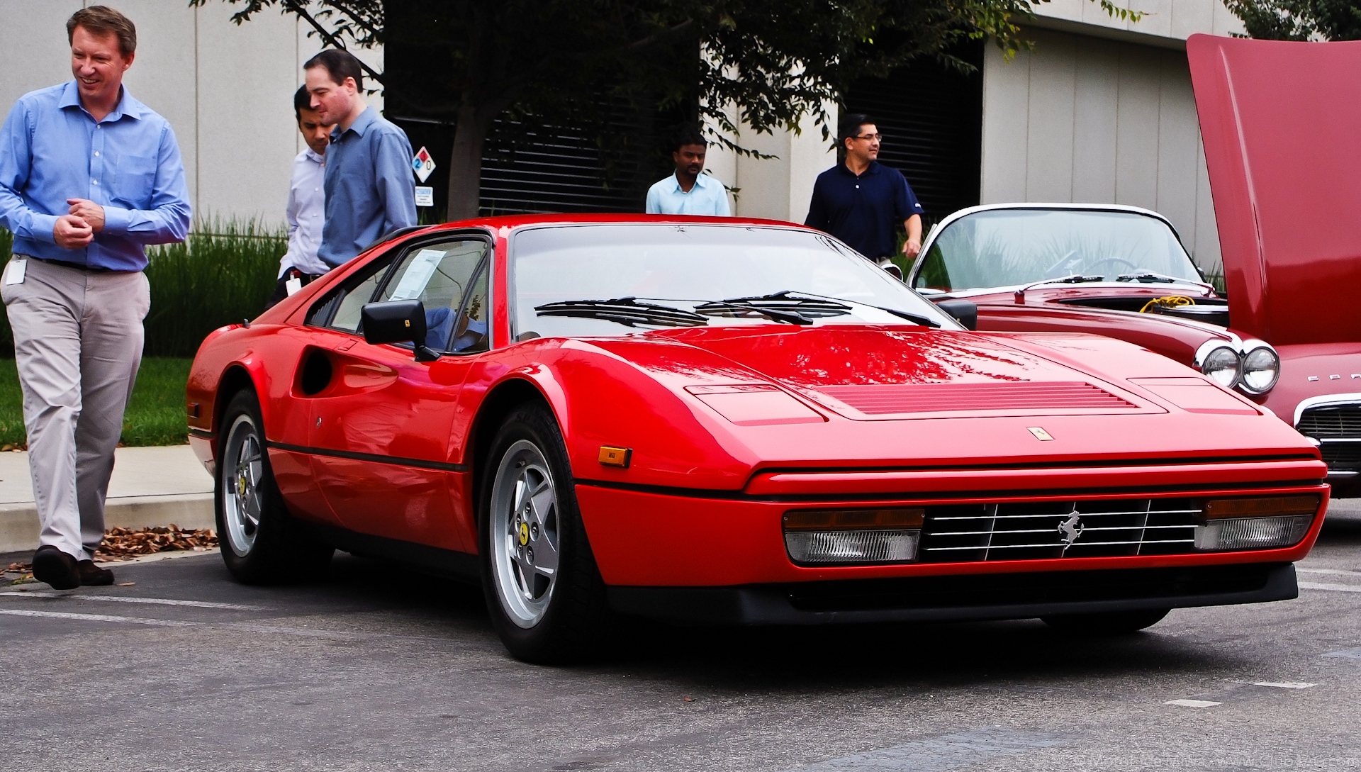 Ferrari 328GTB